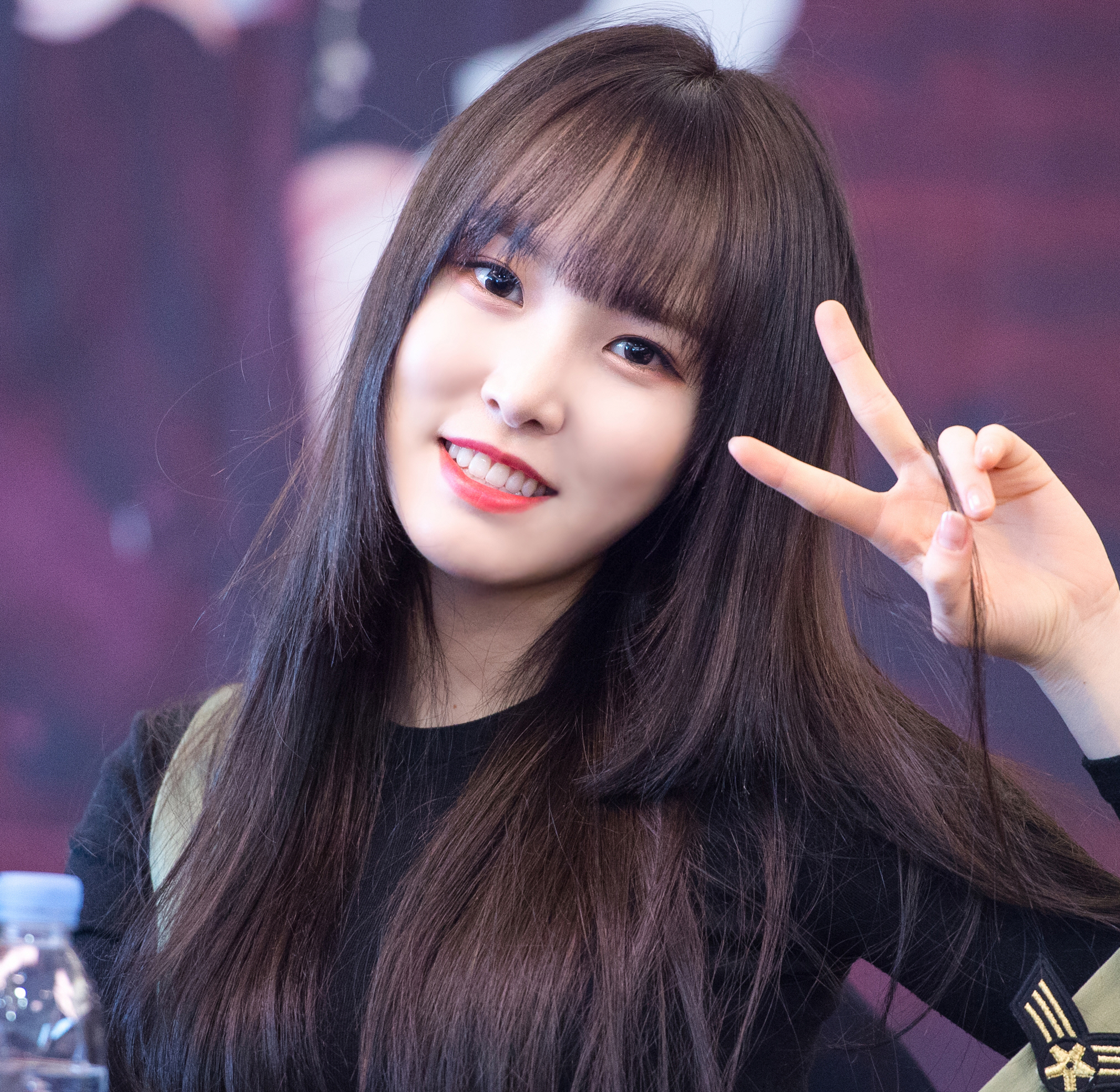 170318 부산 팬싸인회 유주